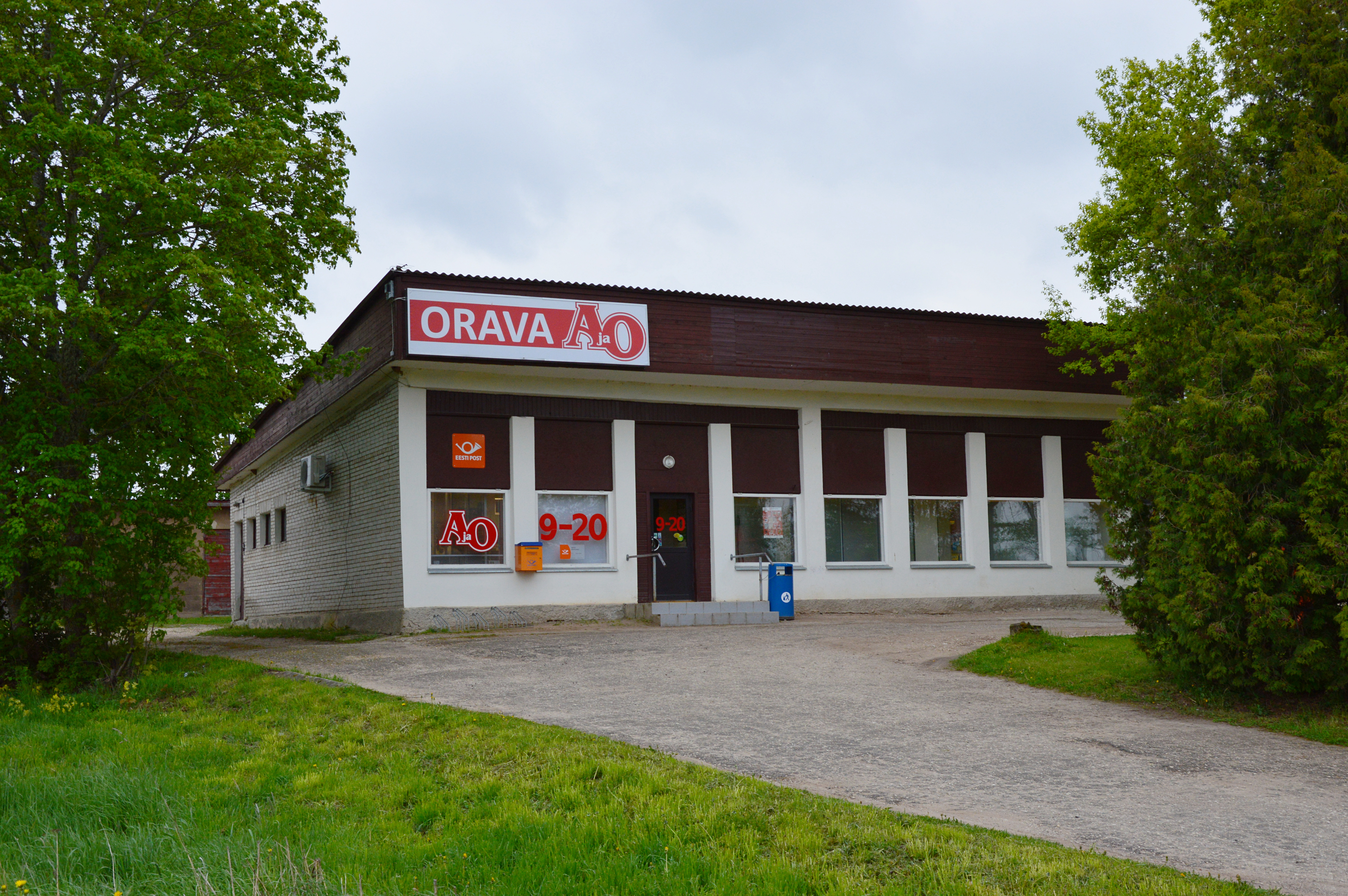 Orava AjaO kauplus.